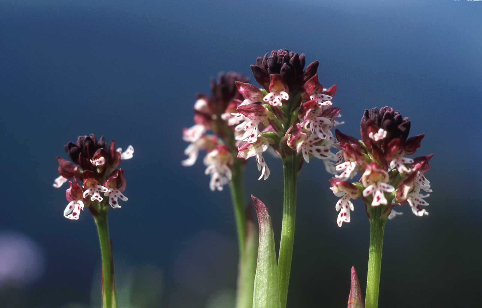 Brandknabenkraut, Orchis ustulata L. (1753)